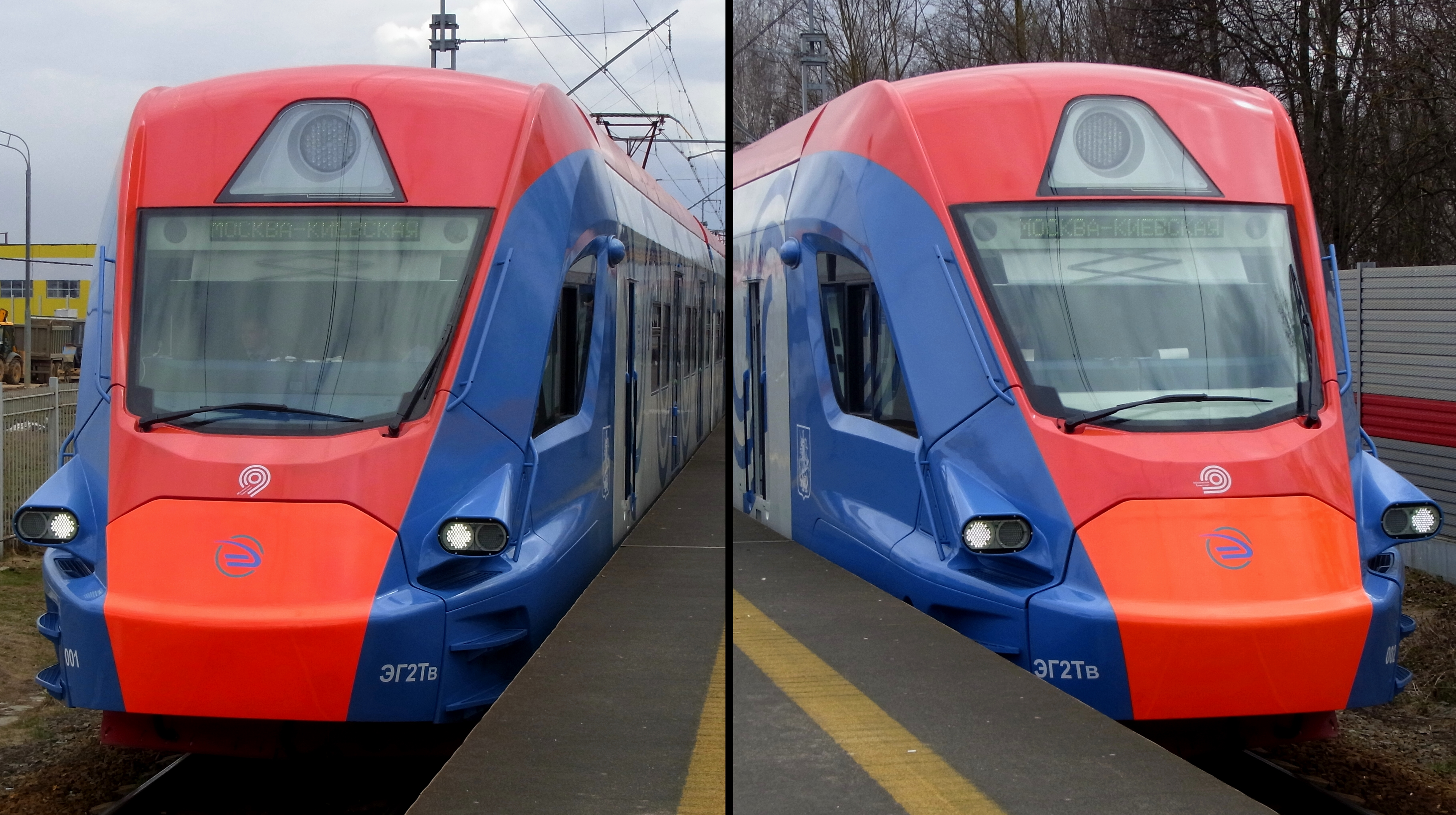 Передняя кабина электропоездов ЭГ2Тв-001 и 002 у платформы Новопеределкино. Сравнение маркировки